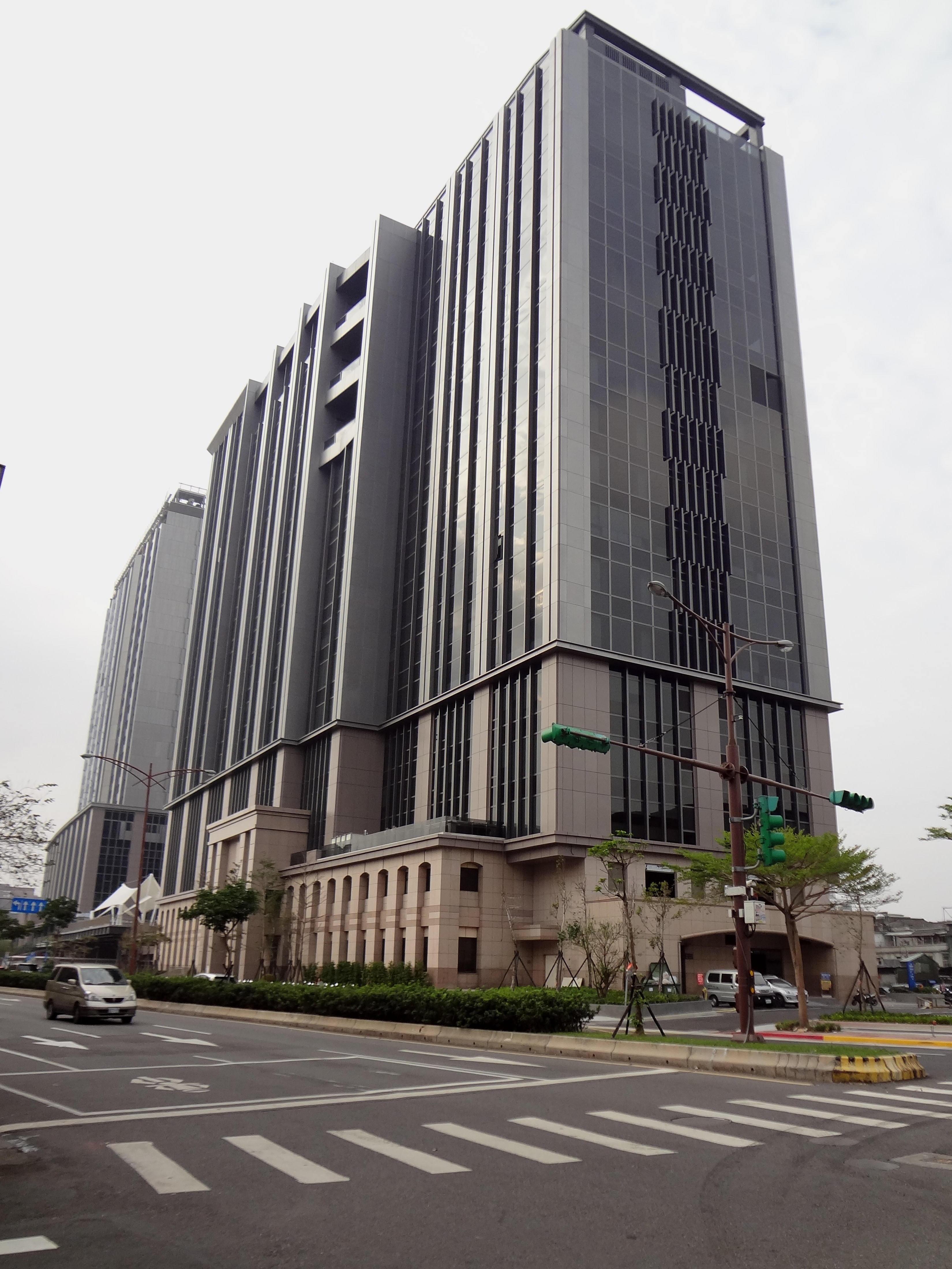 萬華雙子星大樓，拍攝時尚未完工。